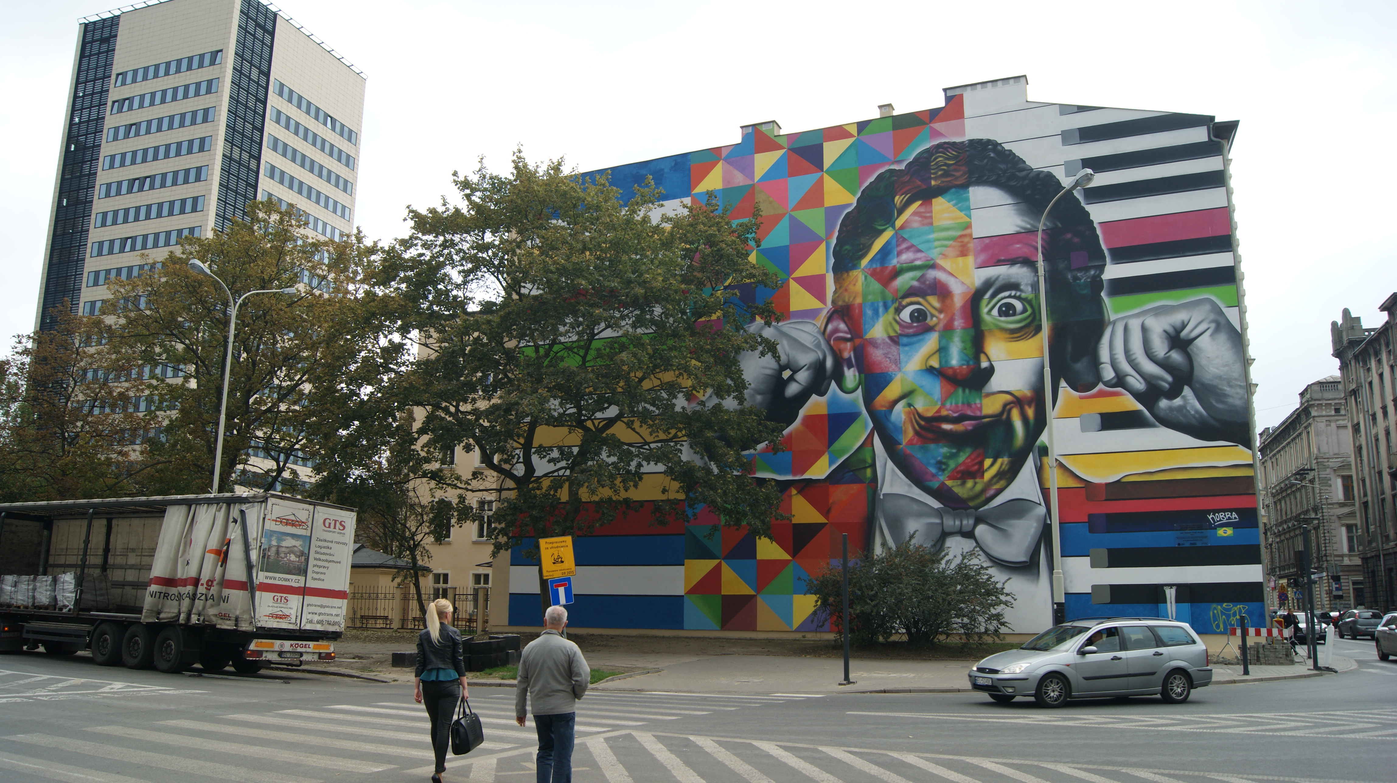 Mural z Arturem Rubinsteinem. Wybitny pianista Artur Rubinstein uśmiecha się z malowidła wielkoformatowego, które odsłonięto na ścianie u zbiegu ulic Sienkiewicza i Traugutta w Łodzi.